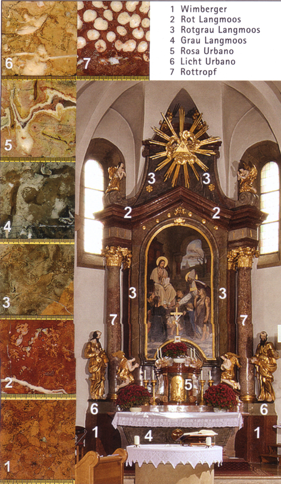 Hauptaltar der Kirche Altlichtenwarth